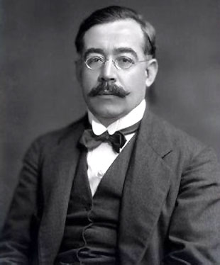 Fotografía del escritor argentino Leopoldo Lugones (1874 - 1938)